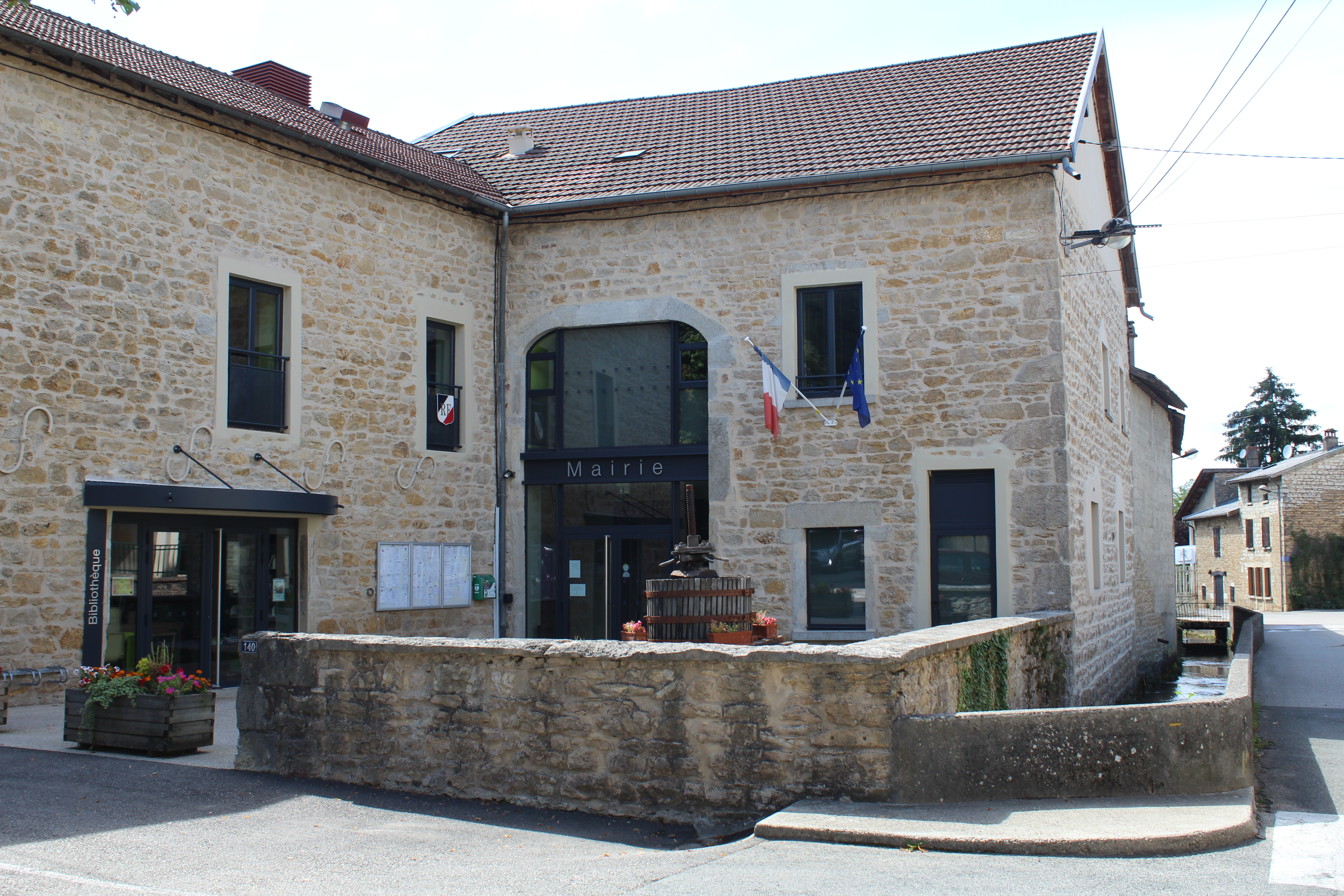 Mairie de Douvres, Ain.